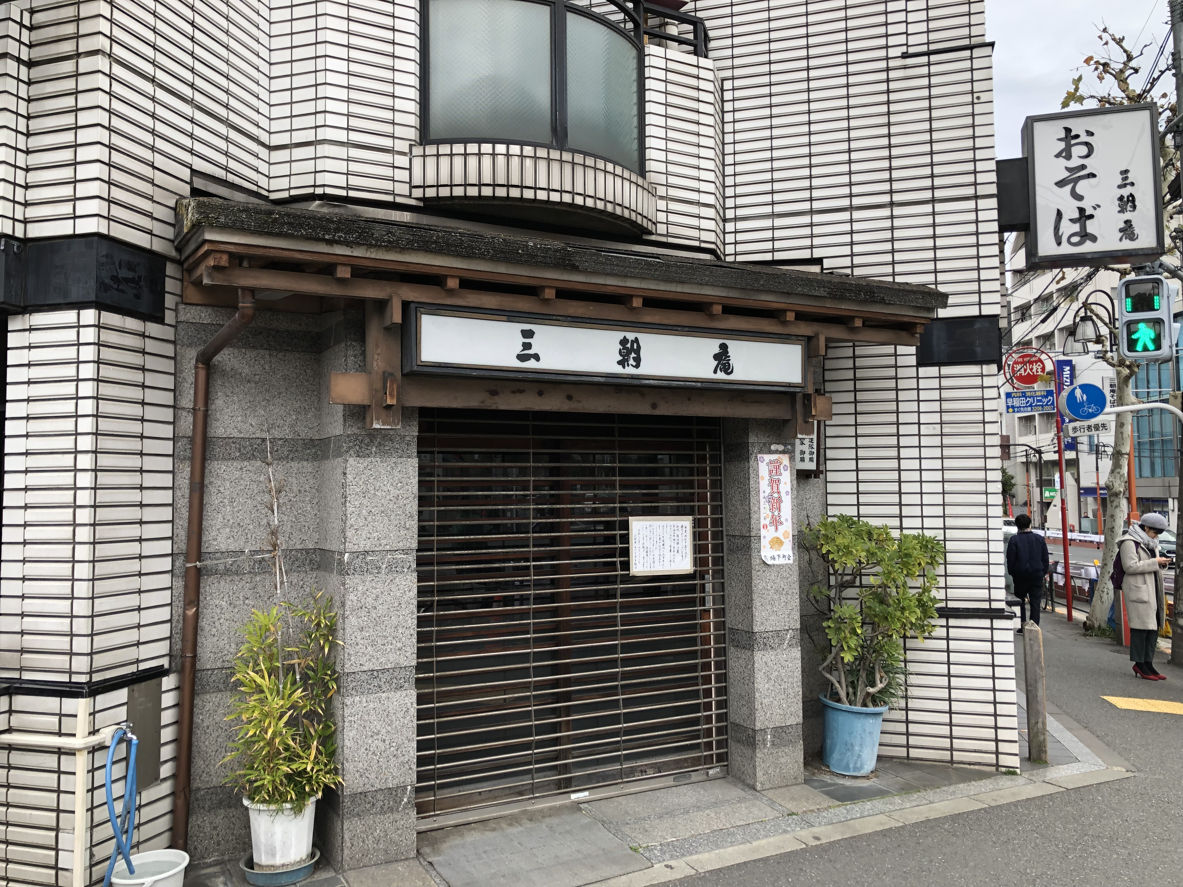 東京都ja:新宿区ja:馬場下町のja:蕎麦屋、三朝庵。撮影したのは閉店から半年ほど経った2019年1月。